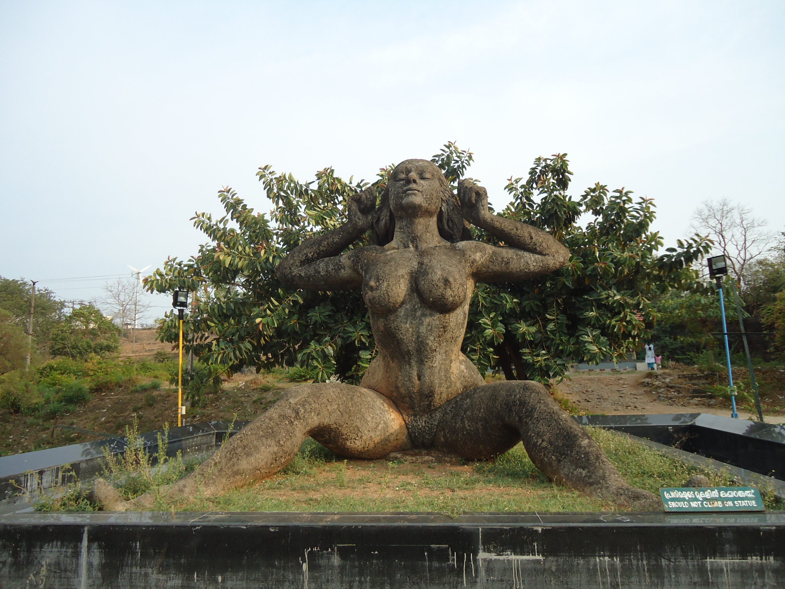 Malampuzha Garden Yakshi Statue by Kanayi Kunjiraman